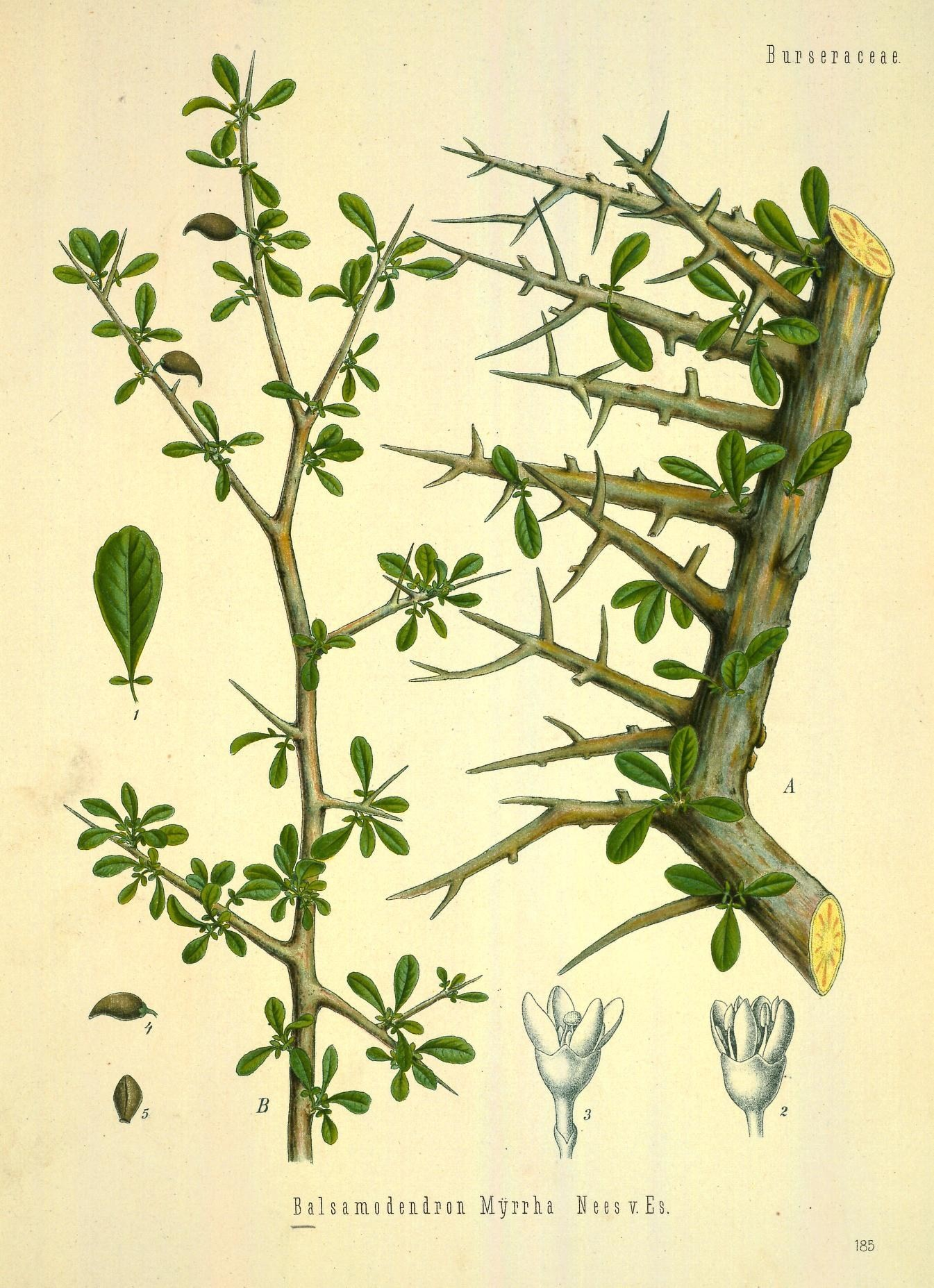 Myrrhe. A Theil eines beblätterten Astes in natürl. Grösse; B Zweigende mit Früchten, desgl.; 1 Blatt, vergrössert; 2 männliche Blüthe von Bals. Ehrenbergianum, nach Berg, desgl.; 3 weibliche Blüthe derselben Art, gleichfalls nach Berg, desgl.; 4 und 5 Frucht, natürl. Grösse.